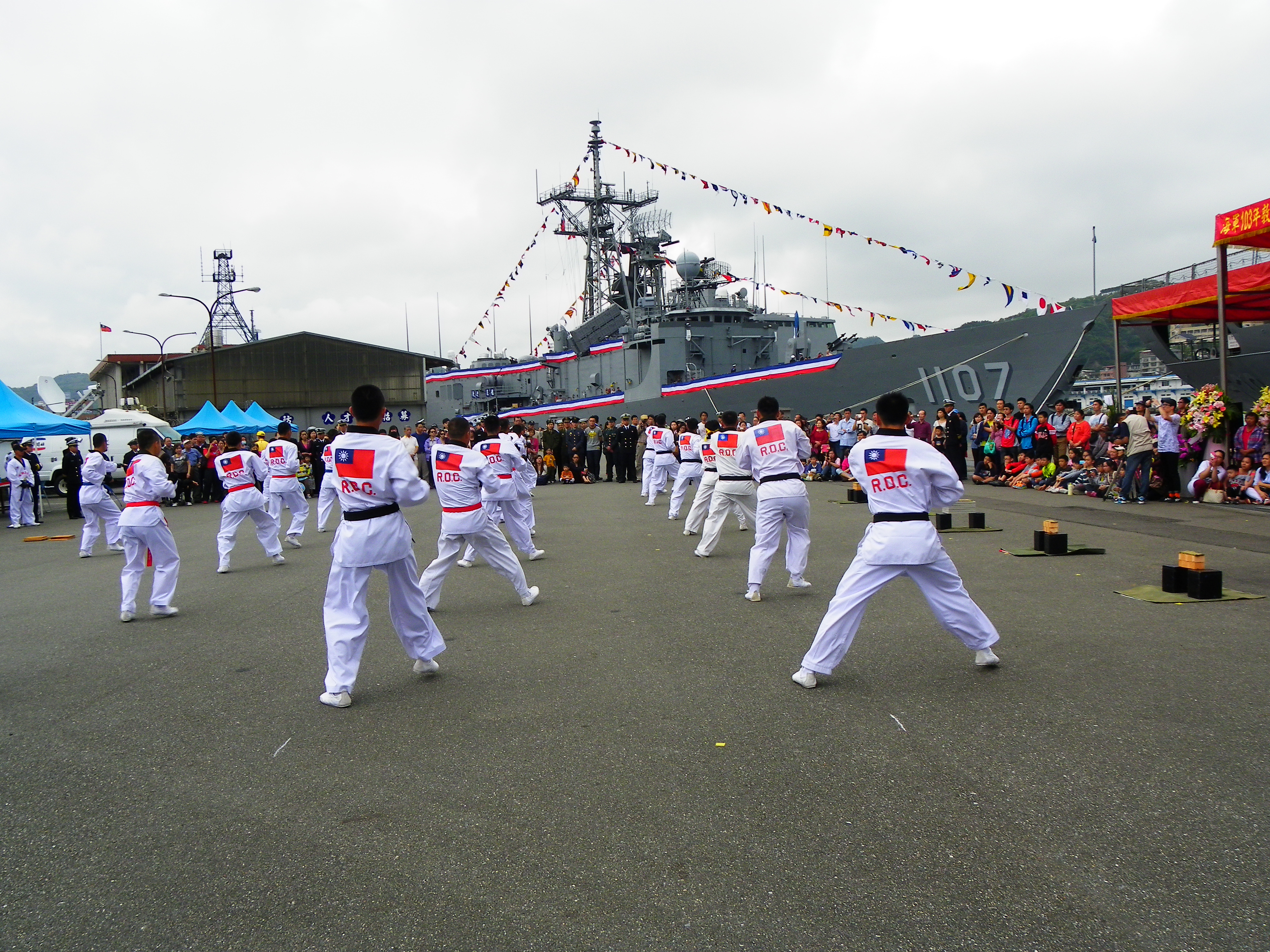 海軍103敦睦遠航訓練支隊基隆訪問，海陸莒拳隊操演南向揮拳，遠方是巡防艦子儀（PFG2-1107）。